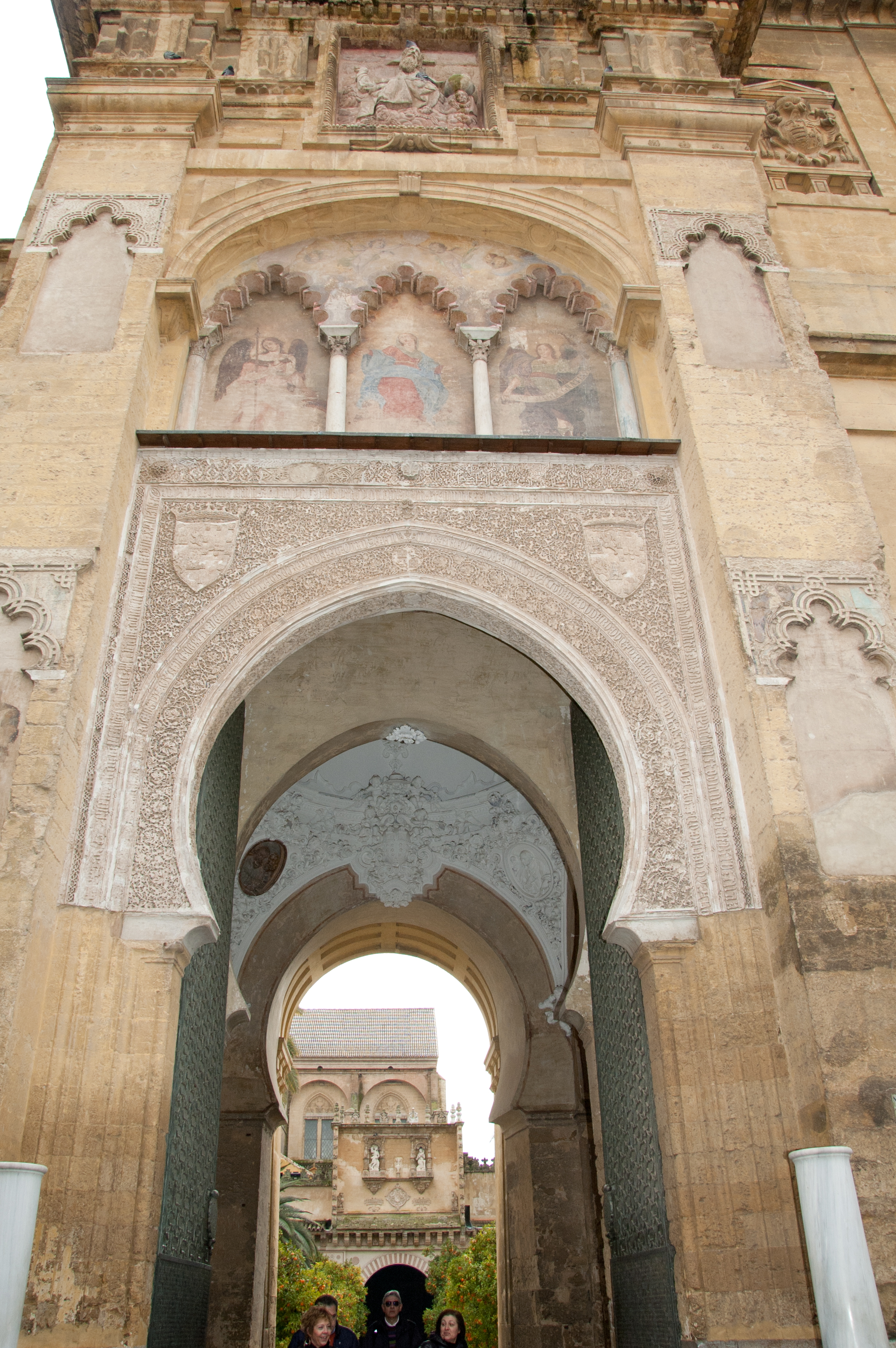 Puerta del Perdón de la Mezquita de Córdoba (España).